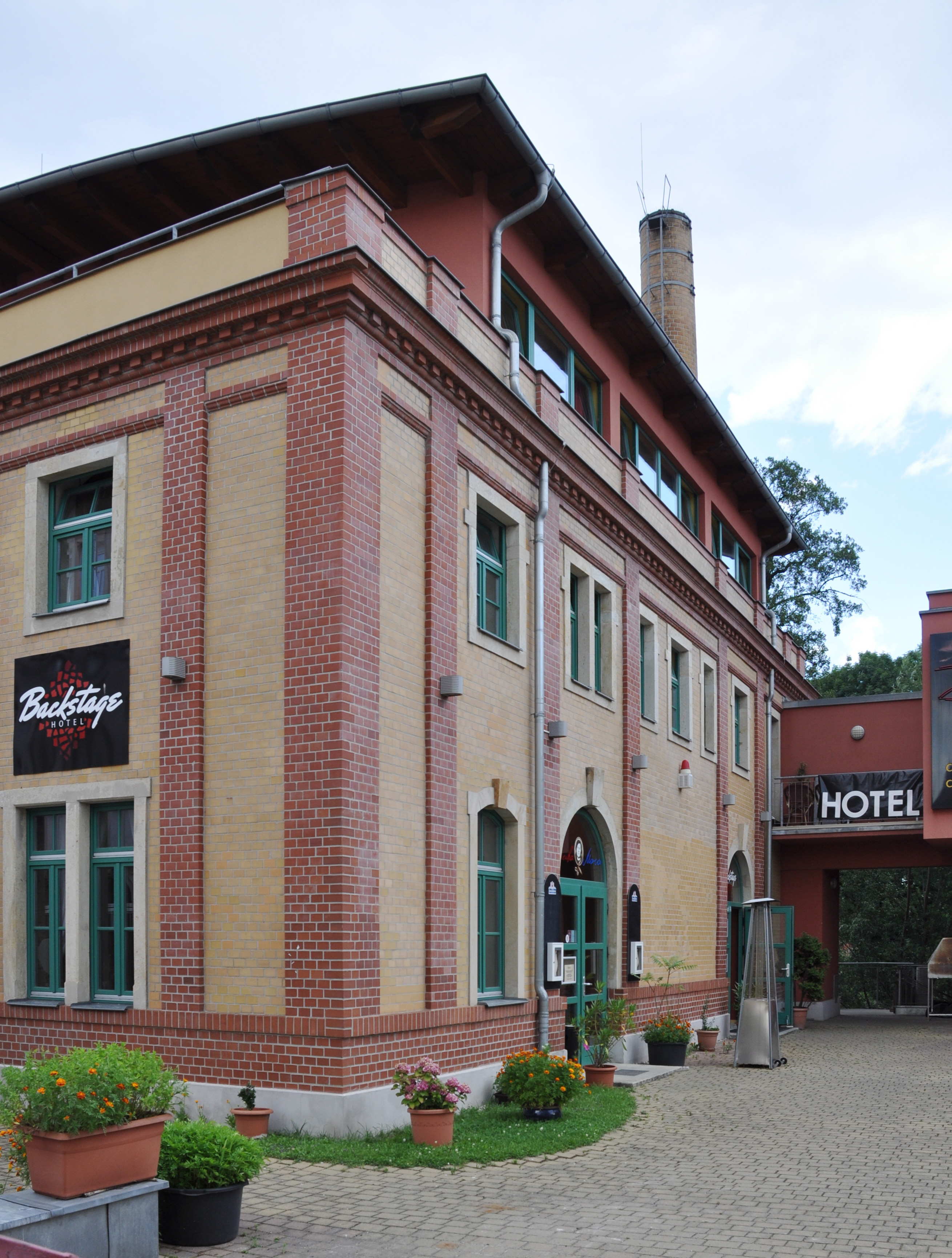 Dresden, Backstage Hotel, Prießnitzstraße 12 (Hinterhaus)